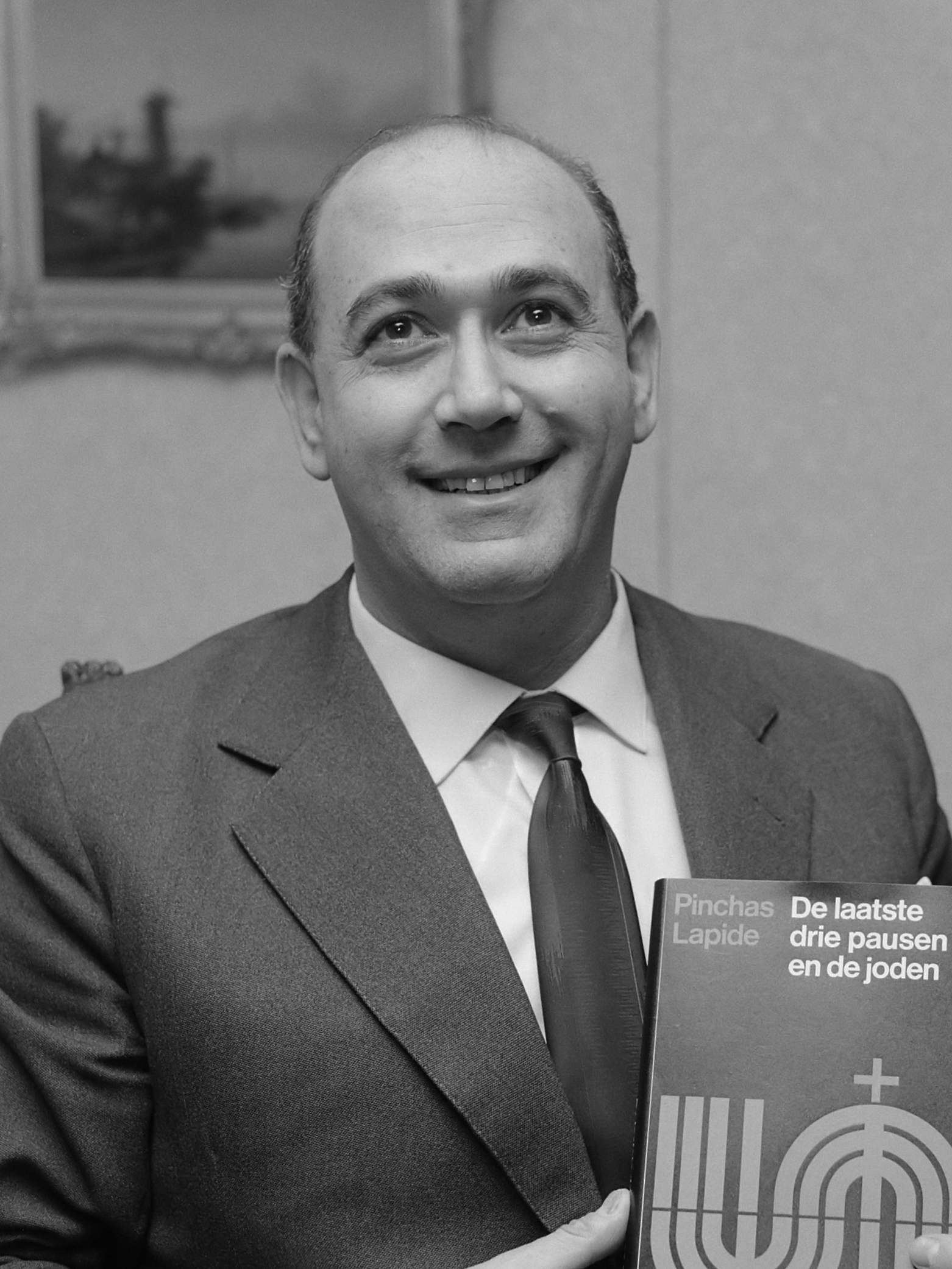 Auteur Pinchas Lapide boek aan Kardinaal Alfrink aangeboden, Pinchas lapide met boek 6 februari 1967